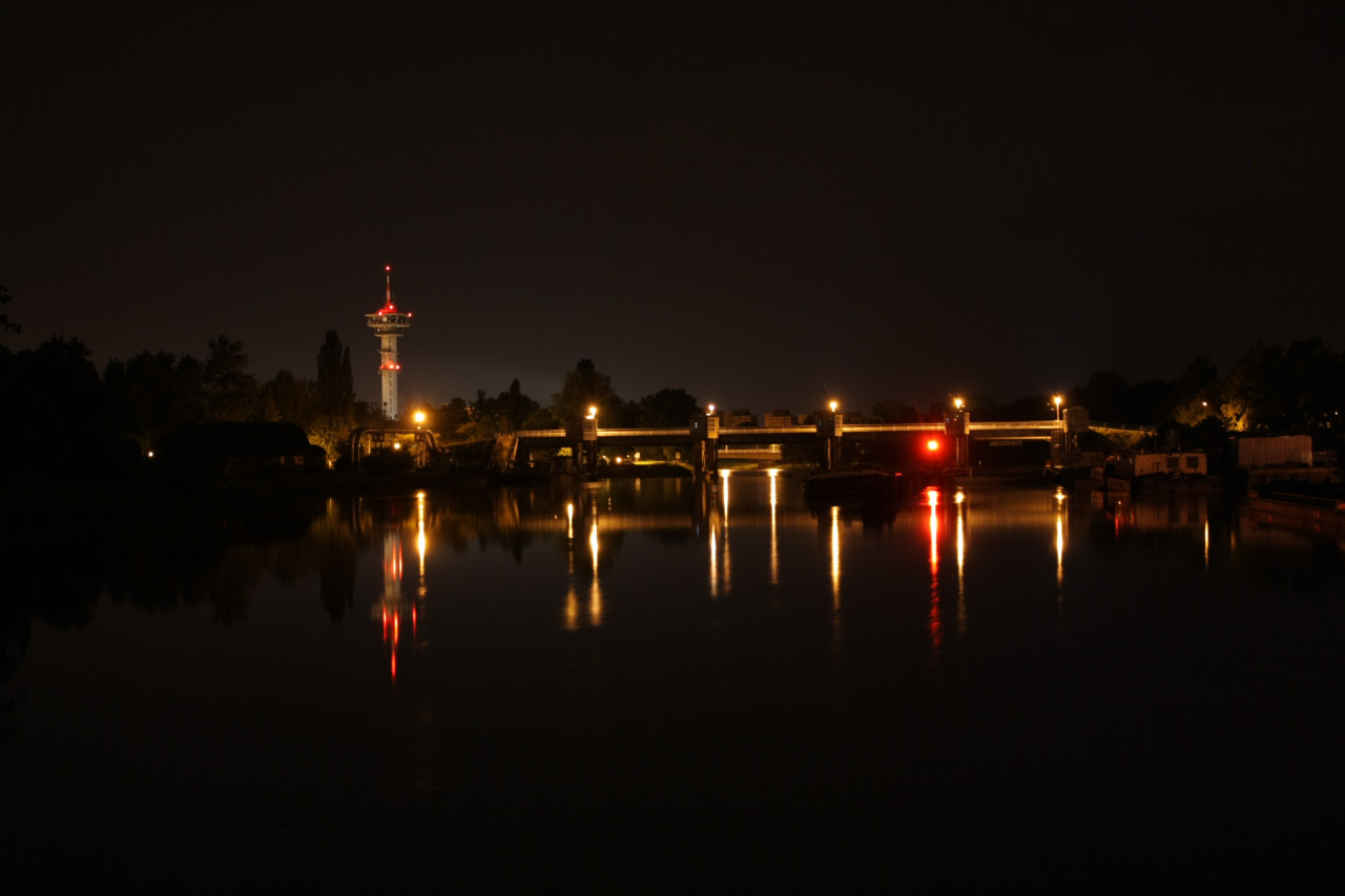 Zdymadlo Pardubice, Pohled na zádrží, vlevo plavební komora.